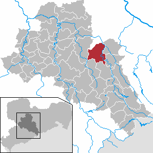 Großschirma in Saxony - district Mittelsachsen